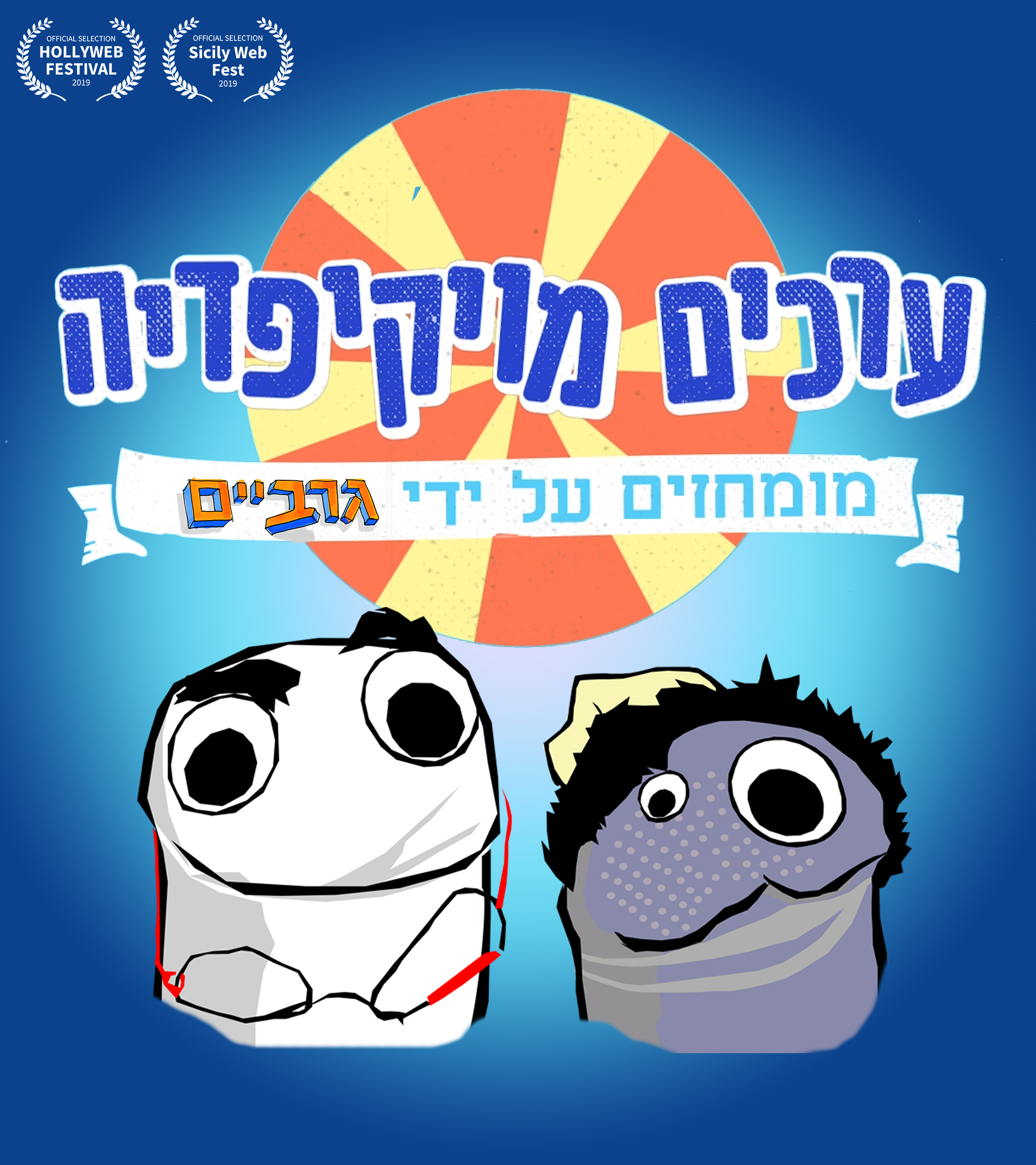 פוסטר של סדרת הרשת ״ערכים מויקיפדיה מומחזים על ידי גרביים״